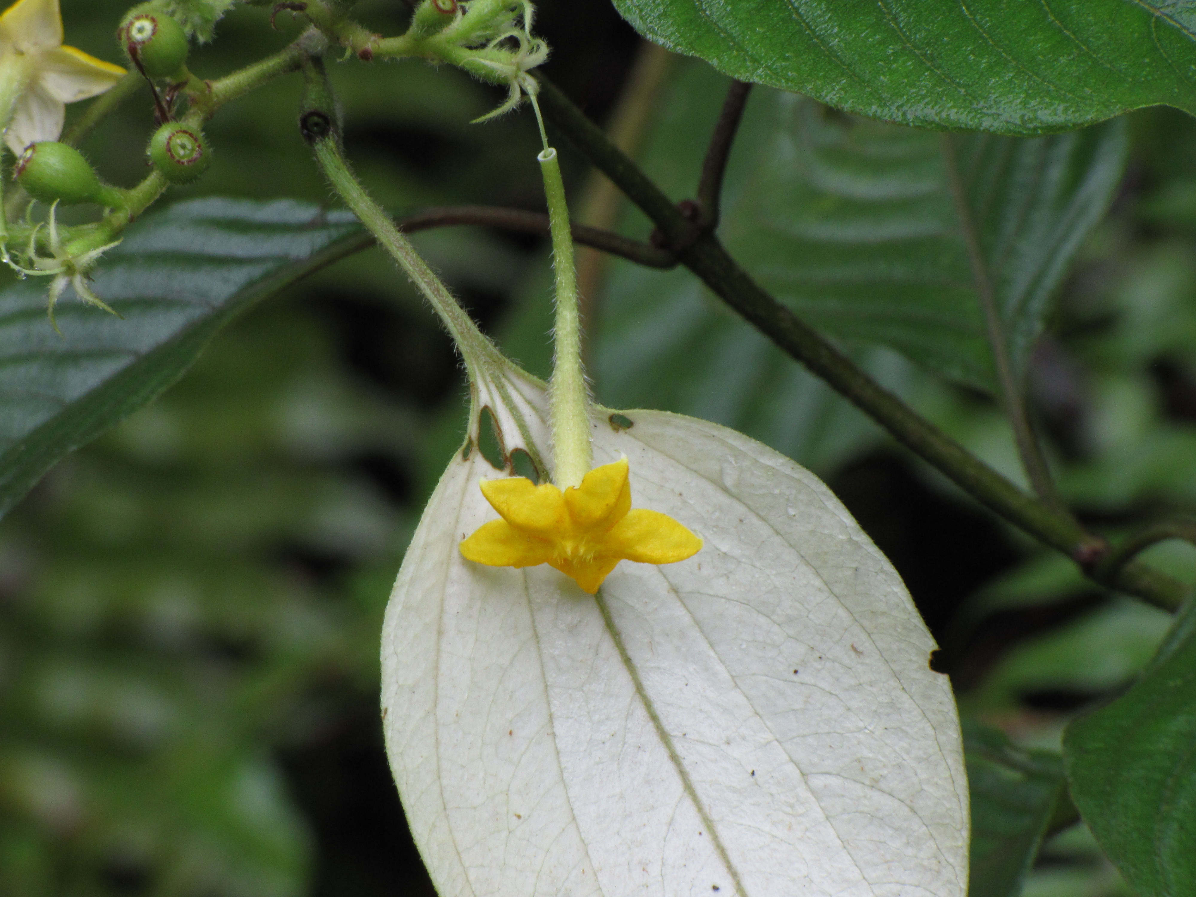 Vellilam Poo